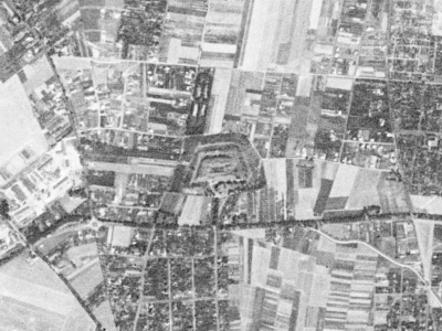 Fort Va Twierdzy Poznań sfotografowany przez satelitę KH-4A 1023, 23 sierpnia 1965 r.